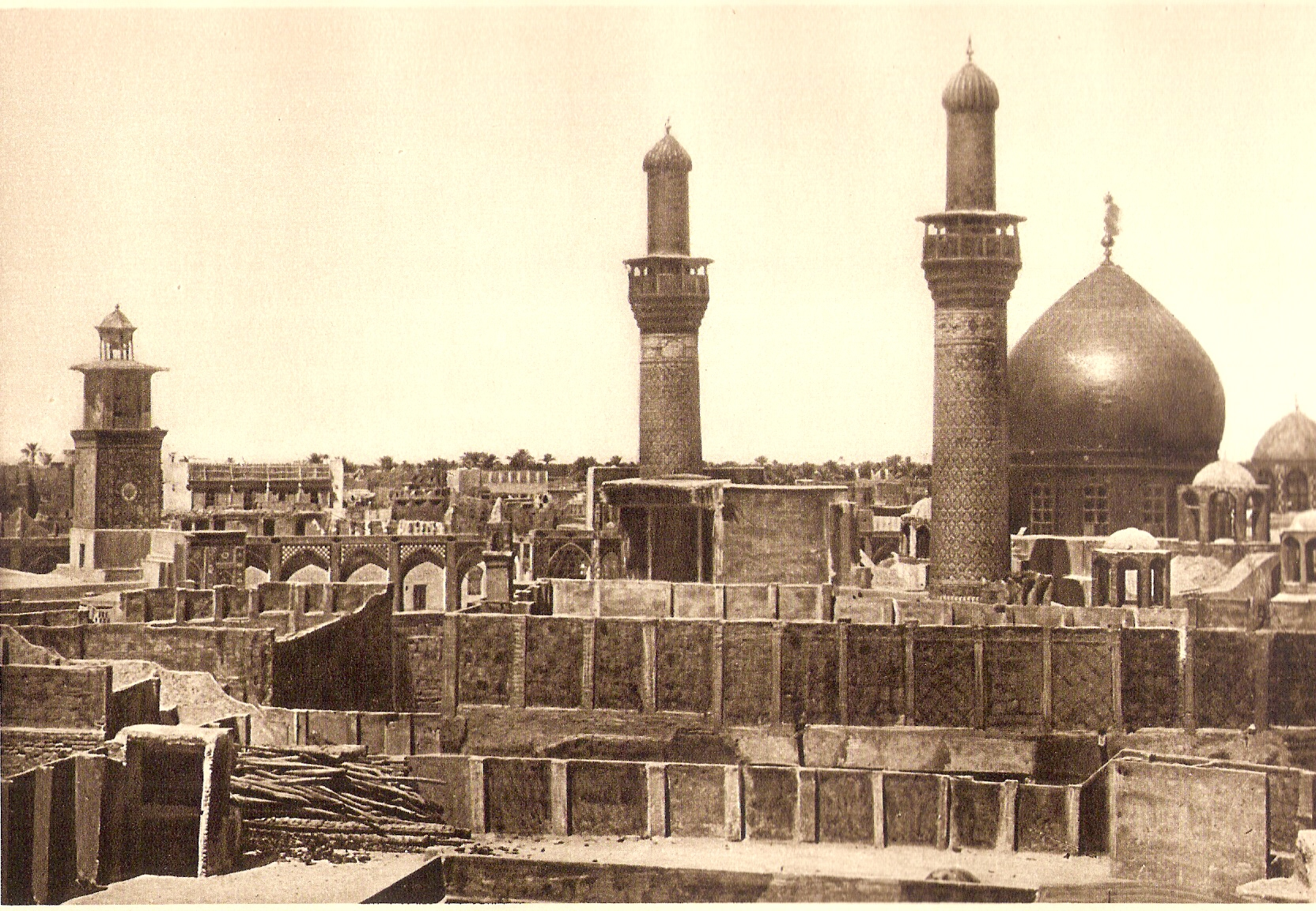 כרבלא בתצלום משנת 1925 לערך